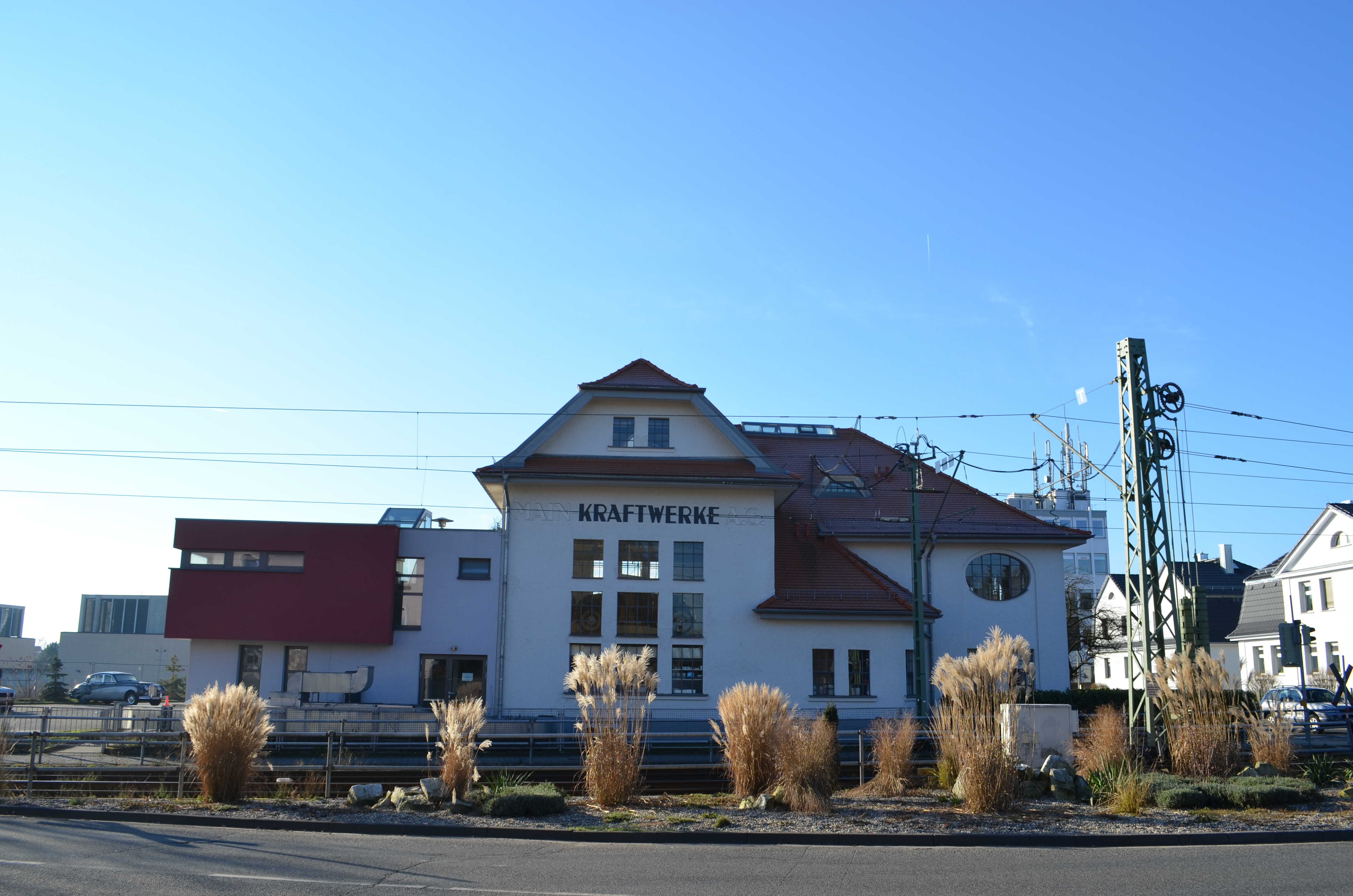 Oberursel, Zimmermühlenweg 2